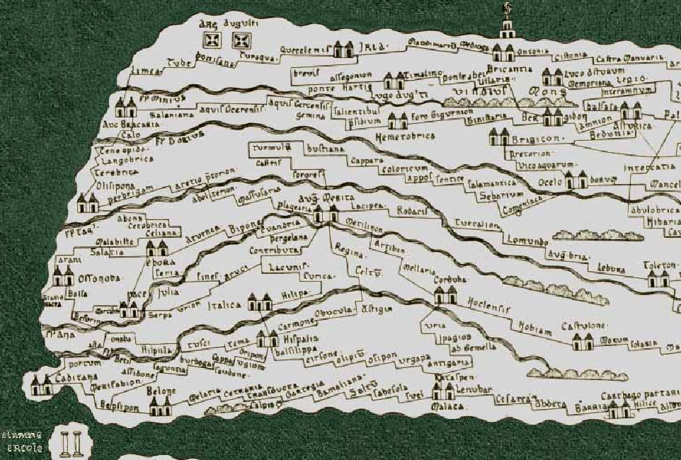 Hispania